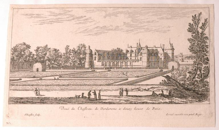 Israël Silvestre château de verderonne